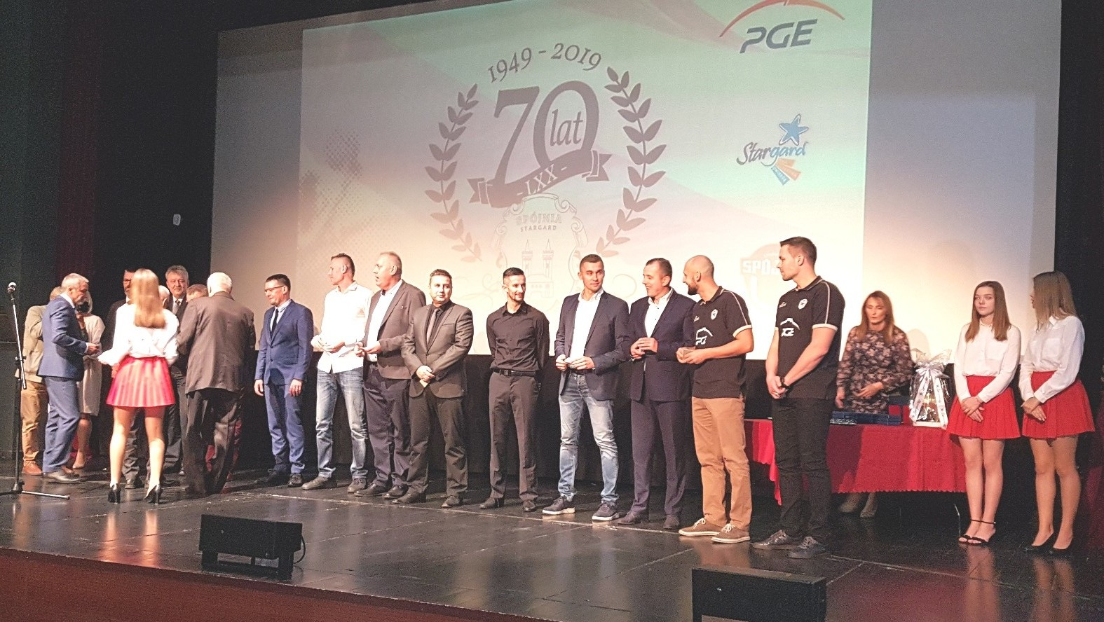 Gala 70-lecie Spójnia Stargard